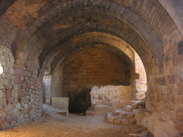 El celler